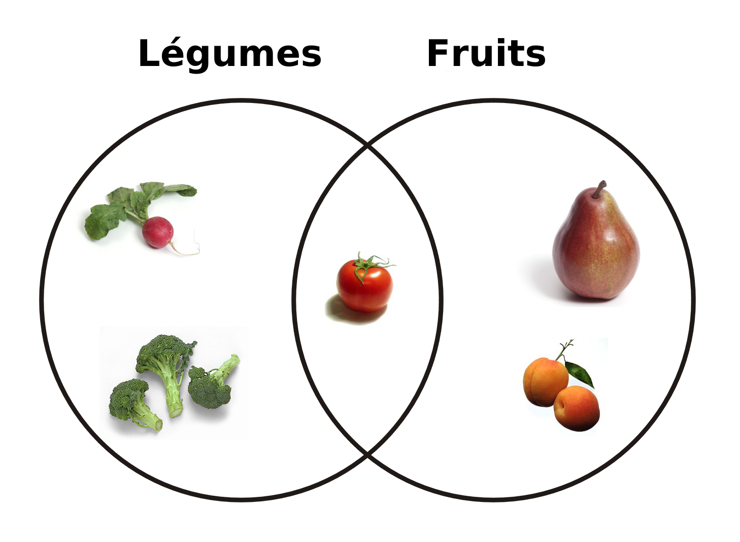 Diagramme de Venn illustrant les relations au plan terminologique entre fruits et légumes